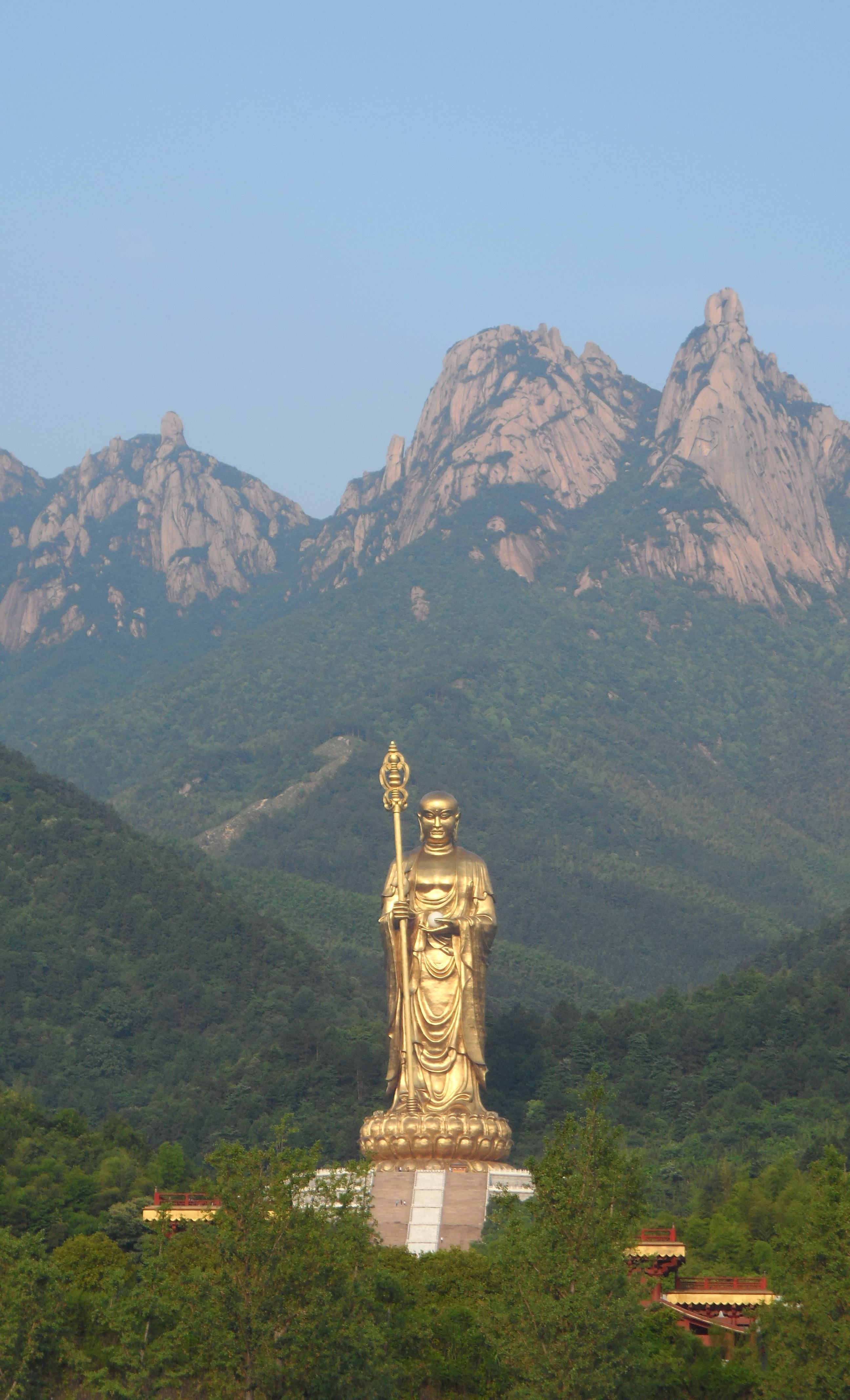 安徽九华山大愿文化园